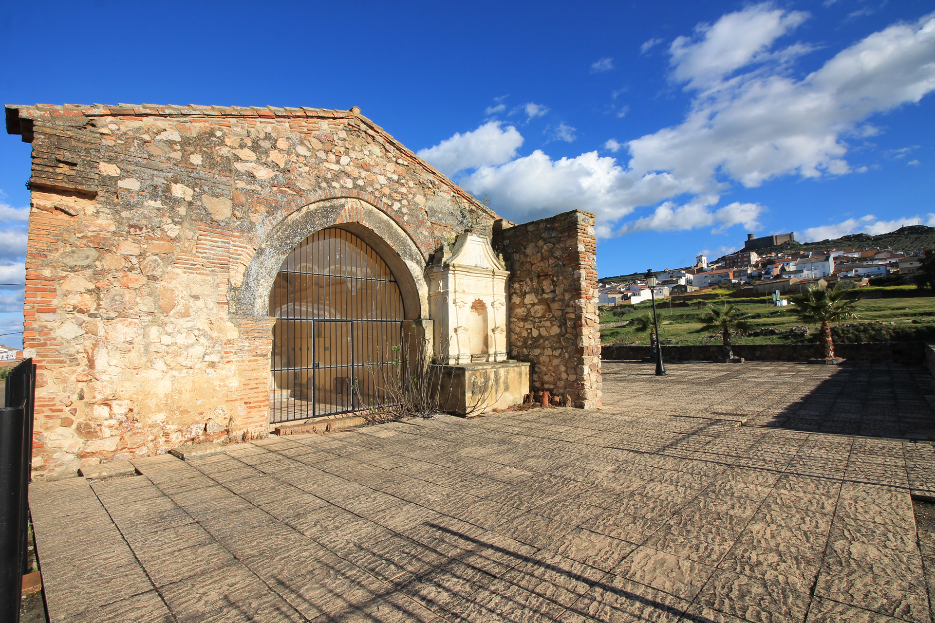 Ermita de San Antón de Puebla de Alcocer